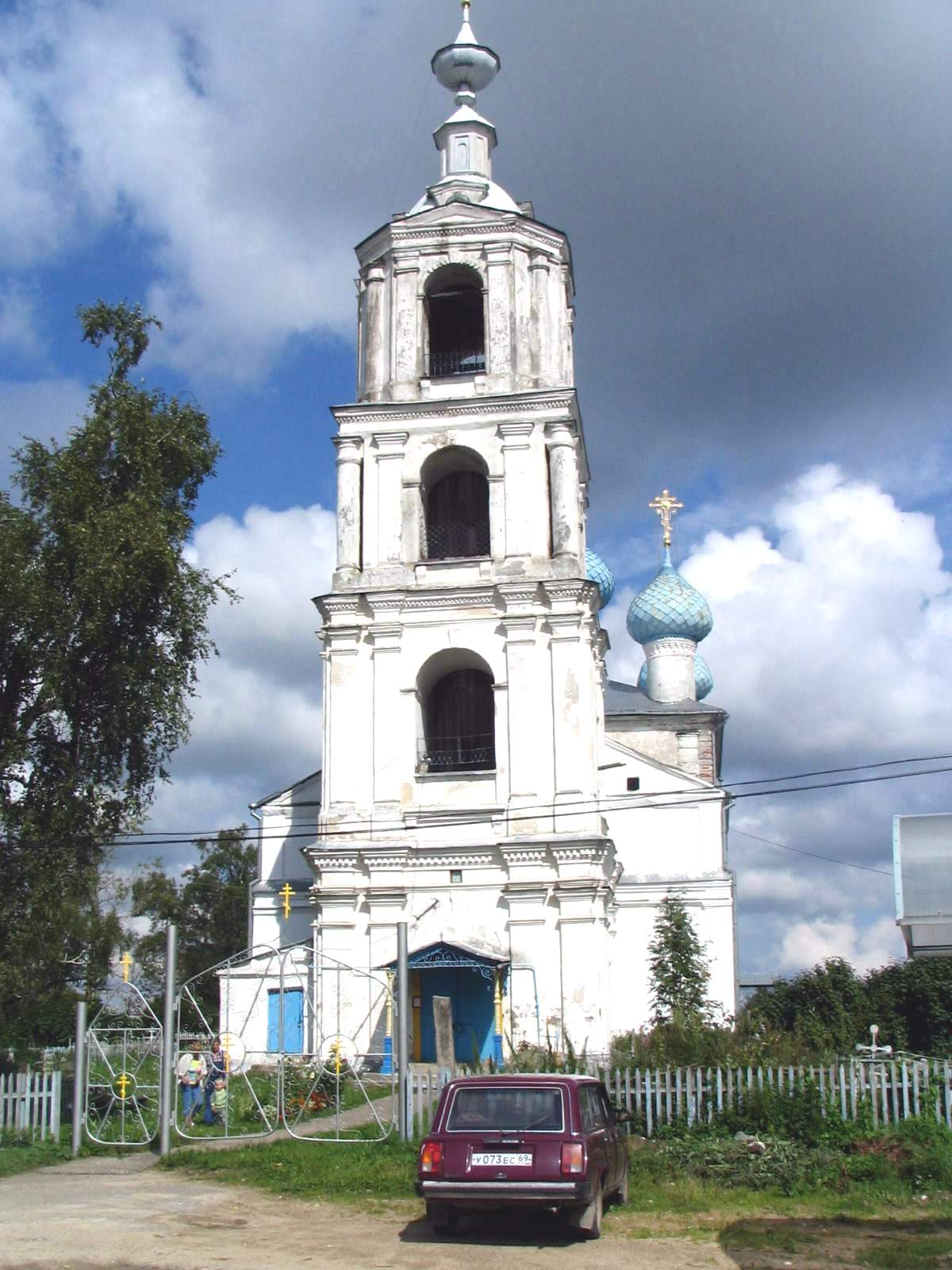 Церковь Николая Чудотворца в посёлке Кесова Гора (Тверская область, Россия).